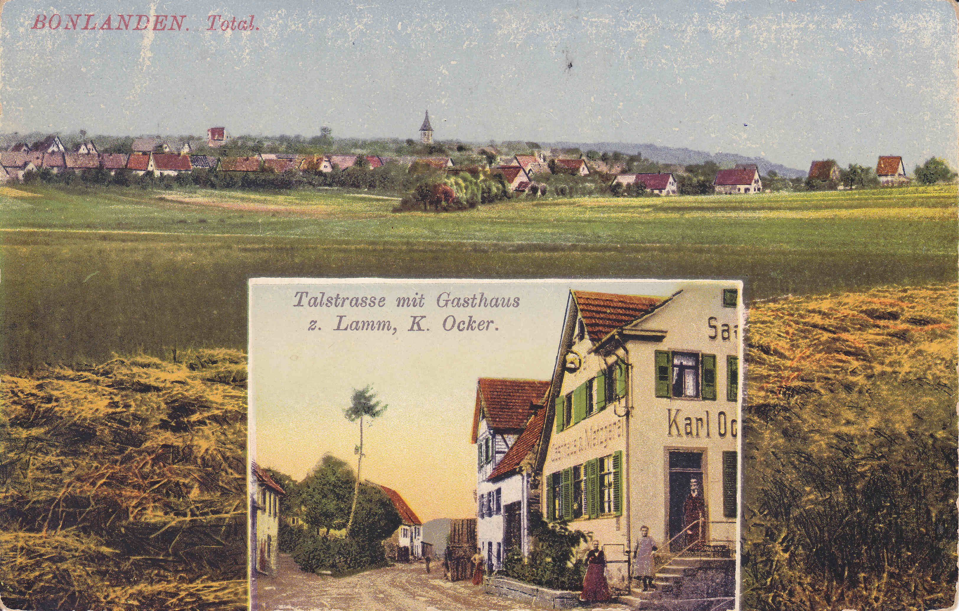 zweigeteilte Postkarte mit Totalansicht von Bonlanden (Filderstadt) sowie der Talstraße mit Gasthaus z. Lamm von Karl Ocker; von ca. 1912